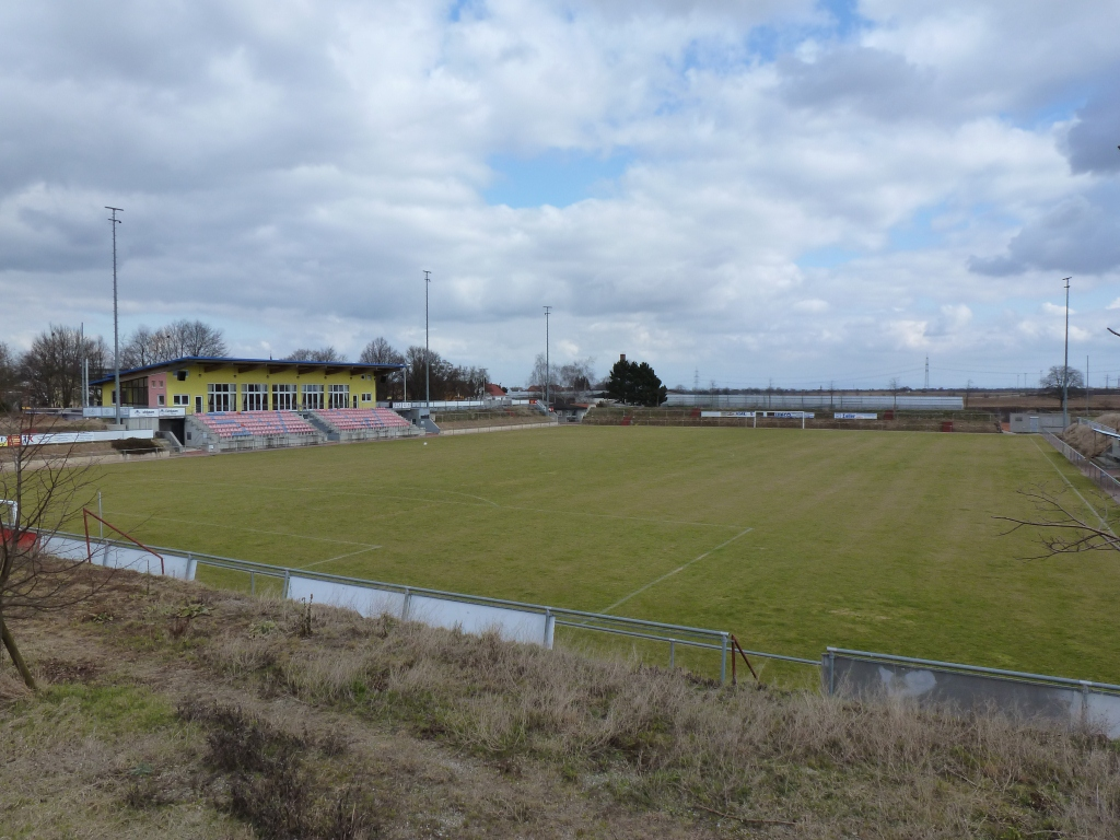 Die Sportanlage des SV Weingarten (Pfalz)